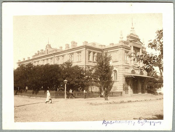 Здание Пушкинской народной аудитории в Кременчуге, до 1917 года